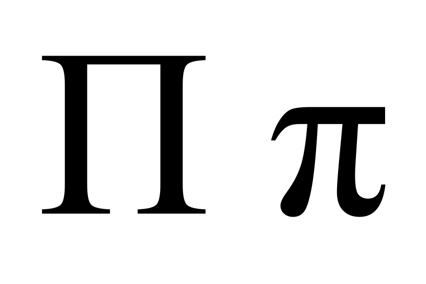 greek letter pi